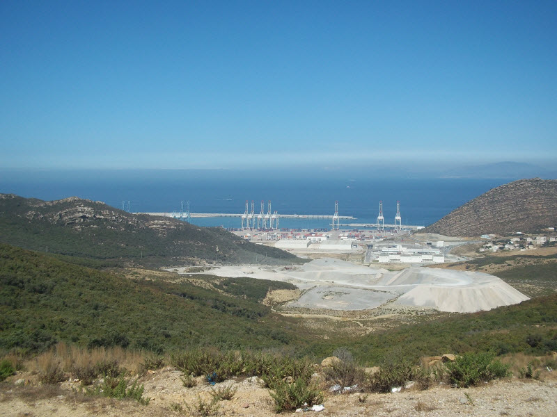 Vista del puerto Tanger-Med